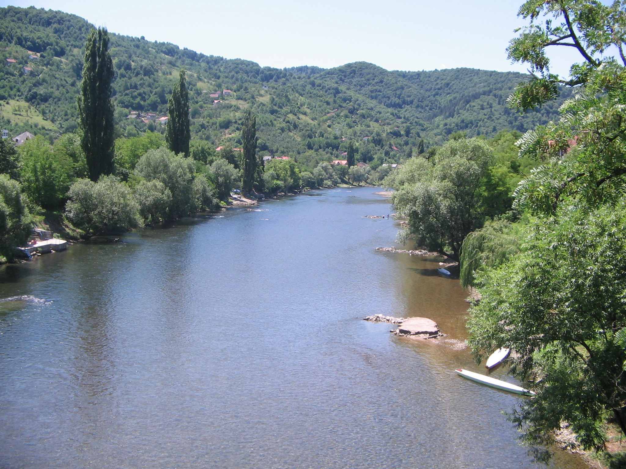 Врбас са Зеленог моста у Бањој Луци.